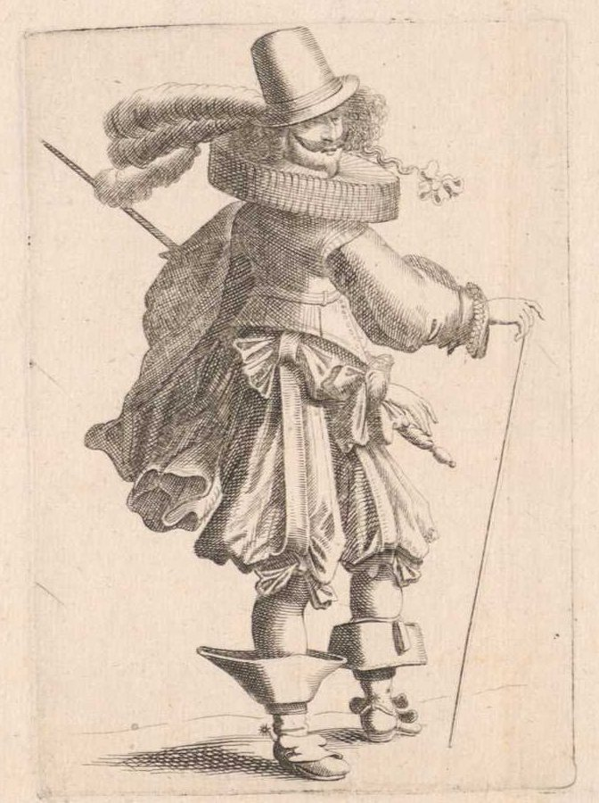 Ausschnitt aus Ein schön new Lied genannt Der Teutsche Michel. VD17 12:666828H